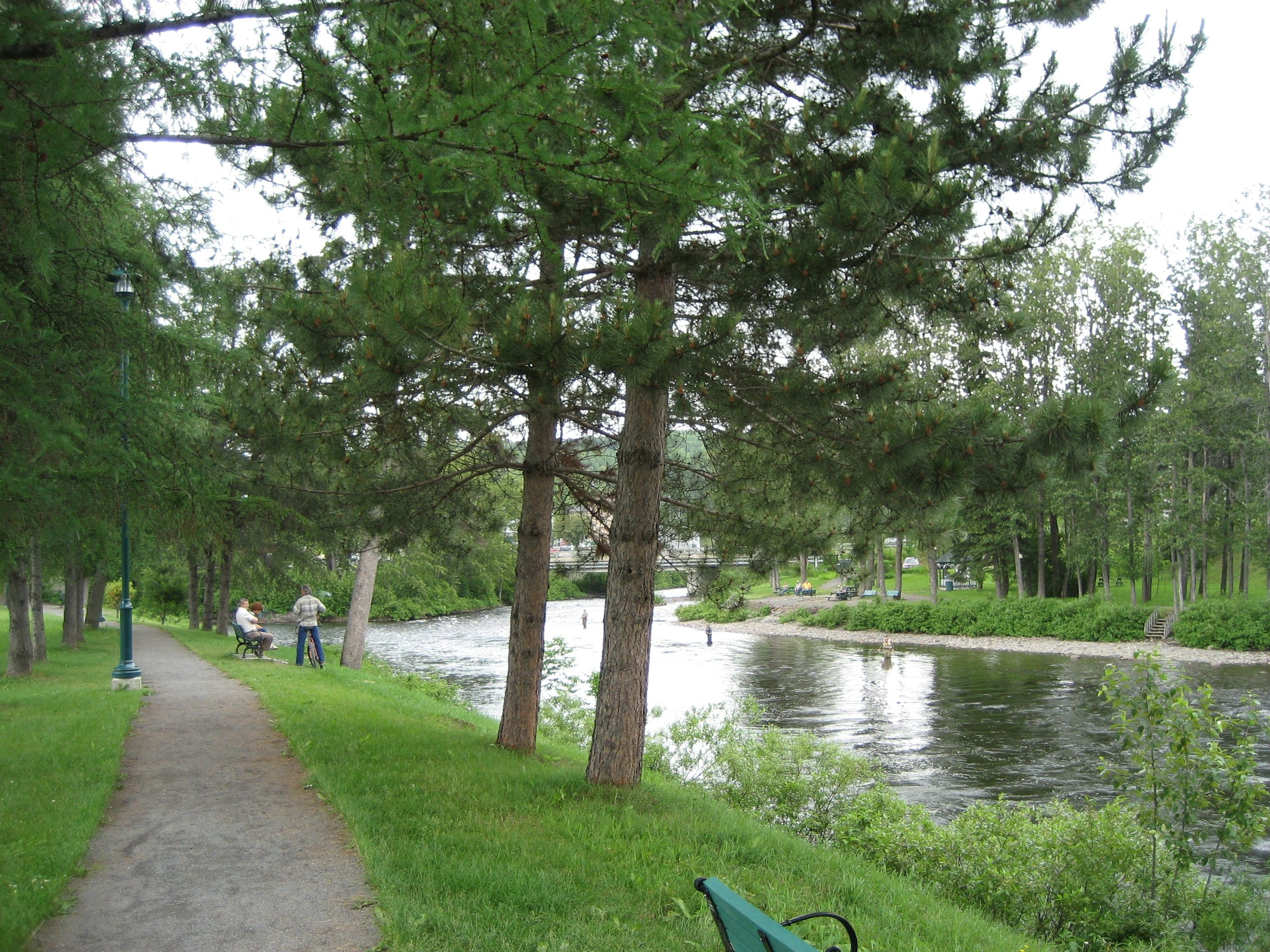 Pêcheurs de saumon sur la fosse Les Fourches sur La rivière Matapédia,Causapscal, Québec.